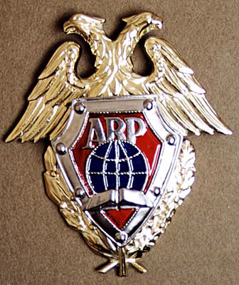 Les armoiries de l'Académie des renseignements extérieurs de Russie